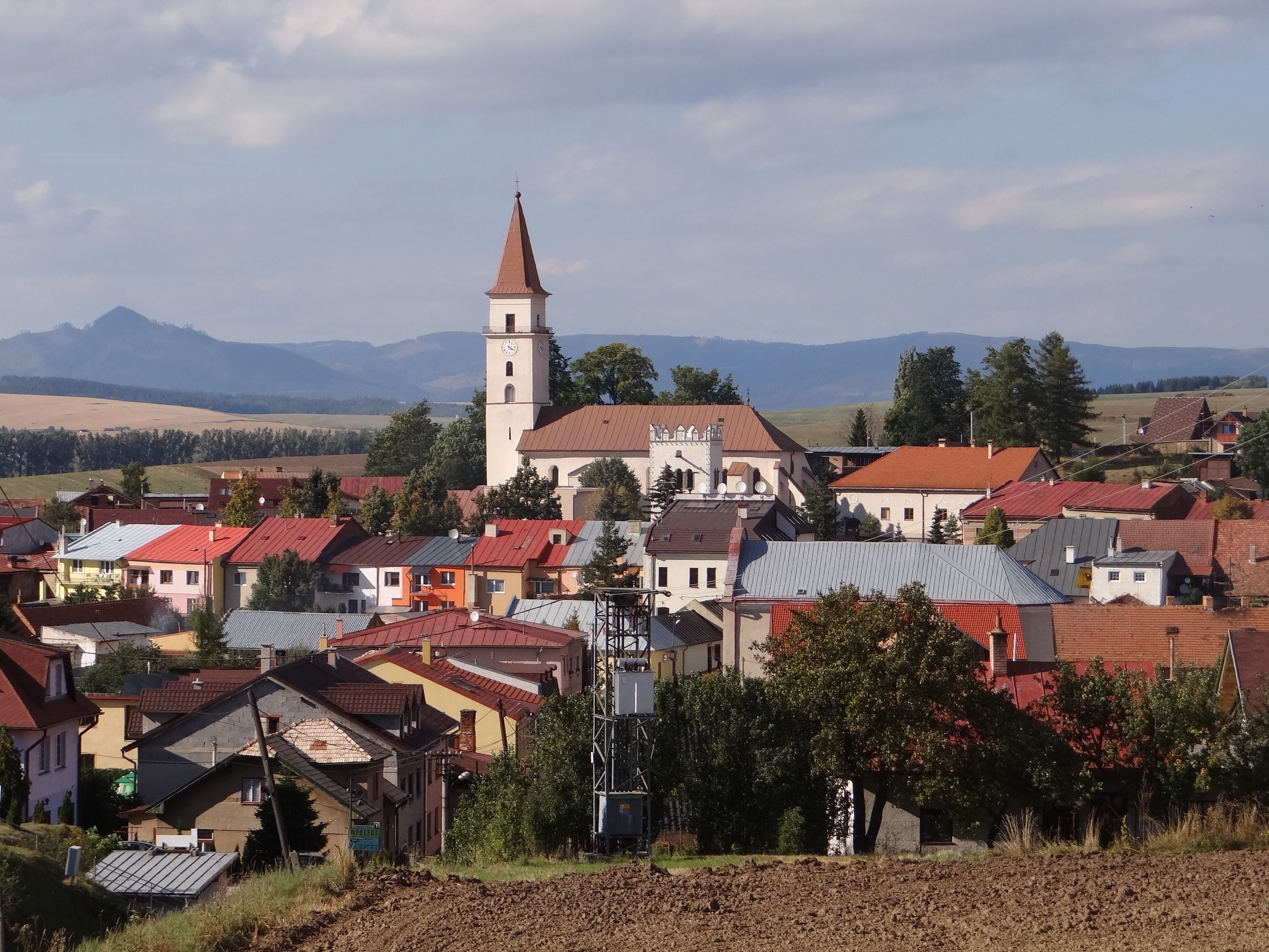 Vrbov